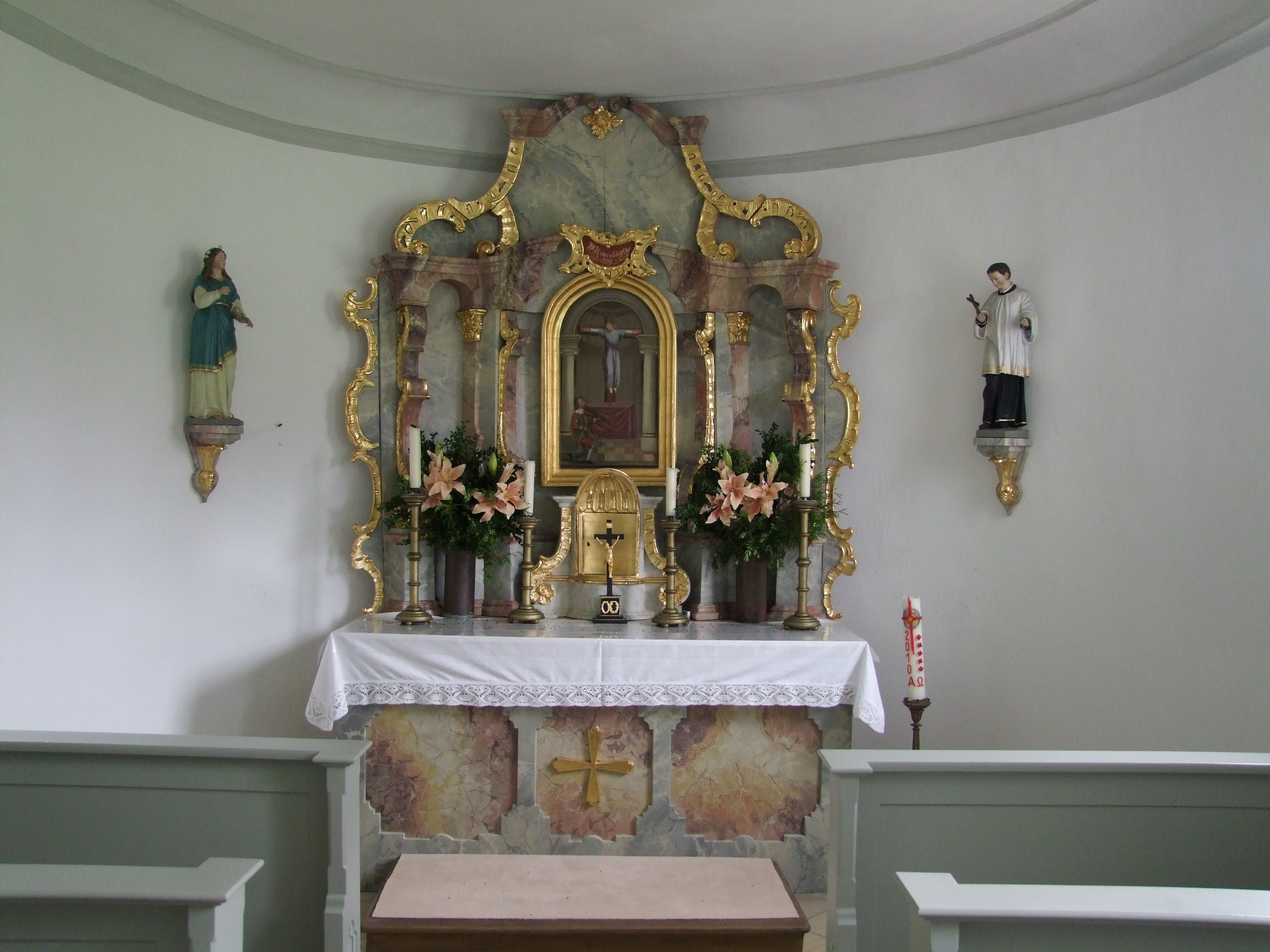 Die Kapelle zur Heiligen Kümmernis in Obergammenried, einem Ortsteil von Bad Wörishofen in Schwaben